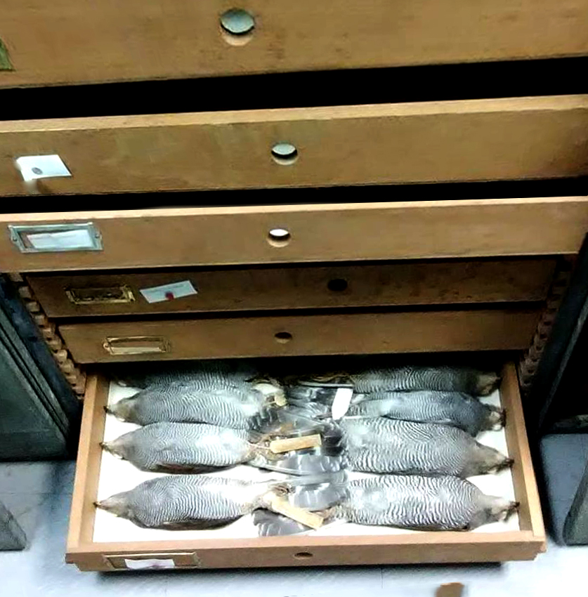 Aves de presa en la colección ornitológia phelps